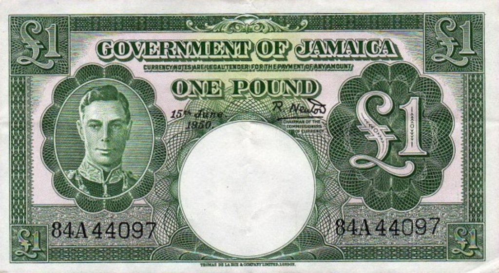 1 fontos jegy előoldala.